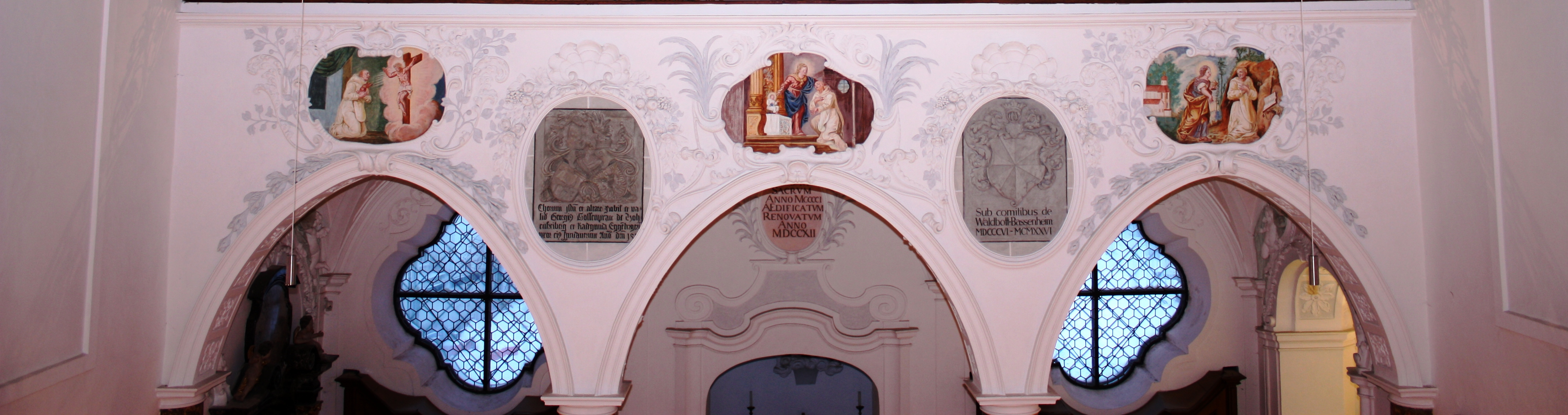 Emporenfresken der ehemaligen Klosterkirche der Kartause in Buxheim bei Memmingen - Google Maps - Google Earth